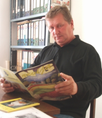 Vjekoslav Hudolin, novinar i enigmat iz Nove Gradiške